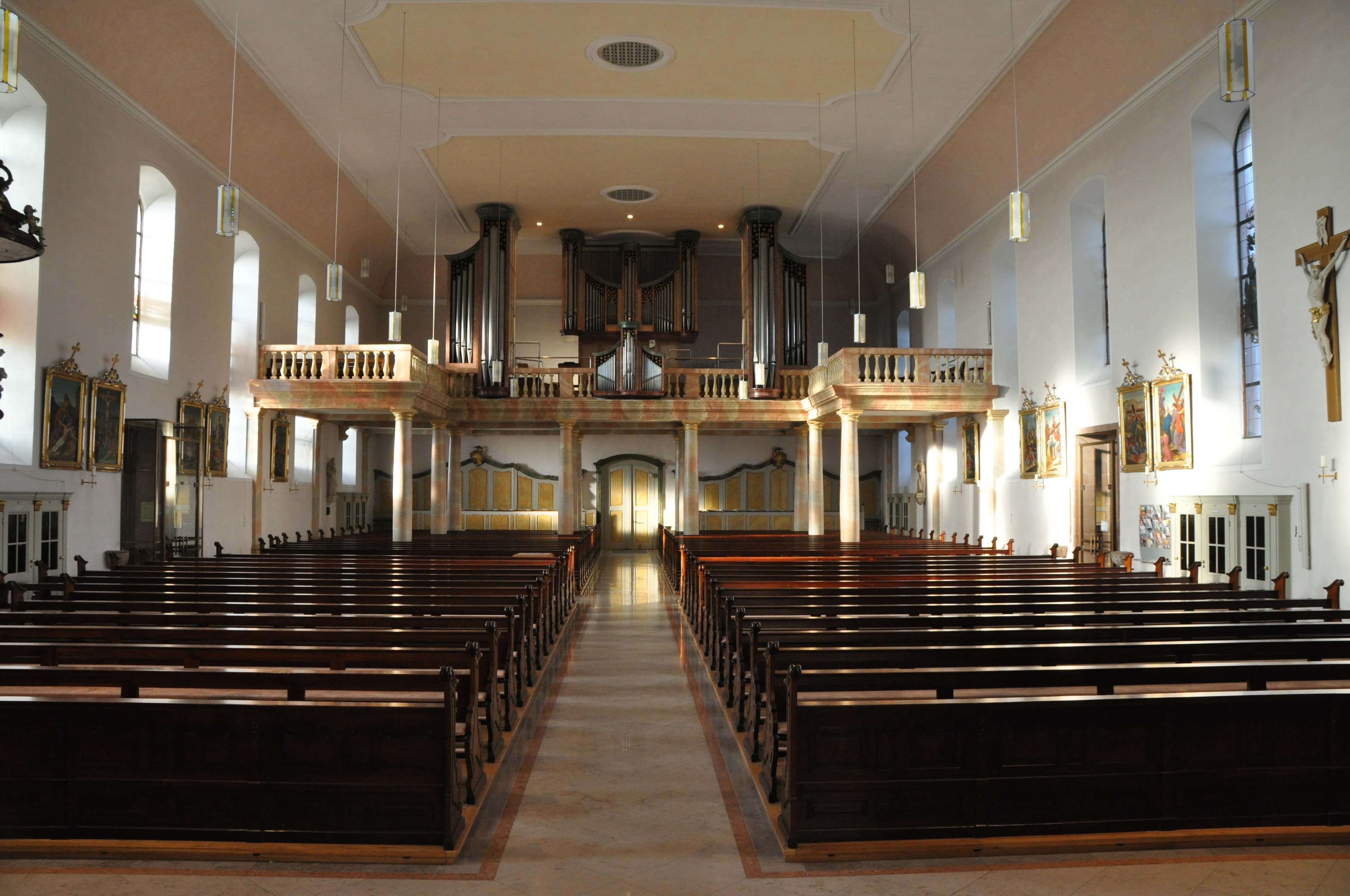 Kirchenraum der kath. Pfarrkirche Herxheim mit Blick auf die Empore